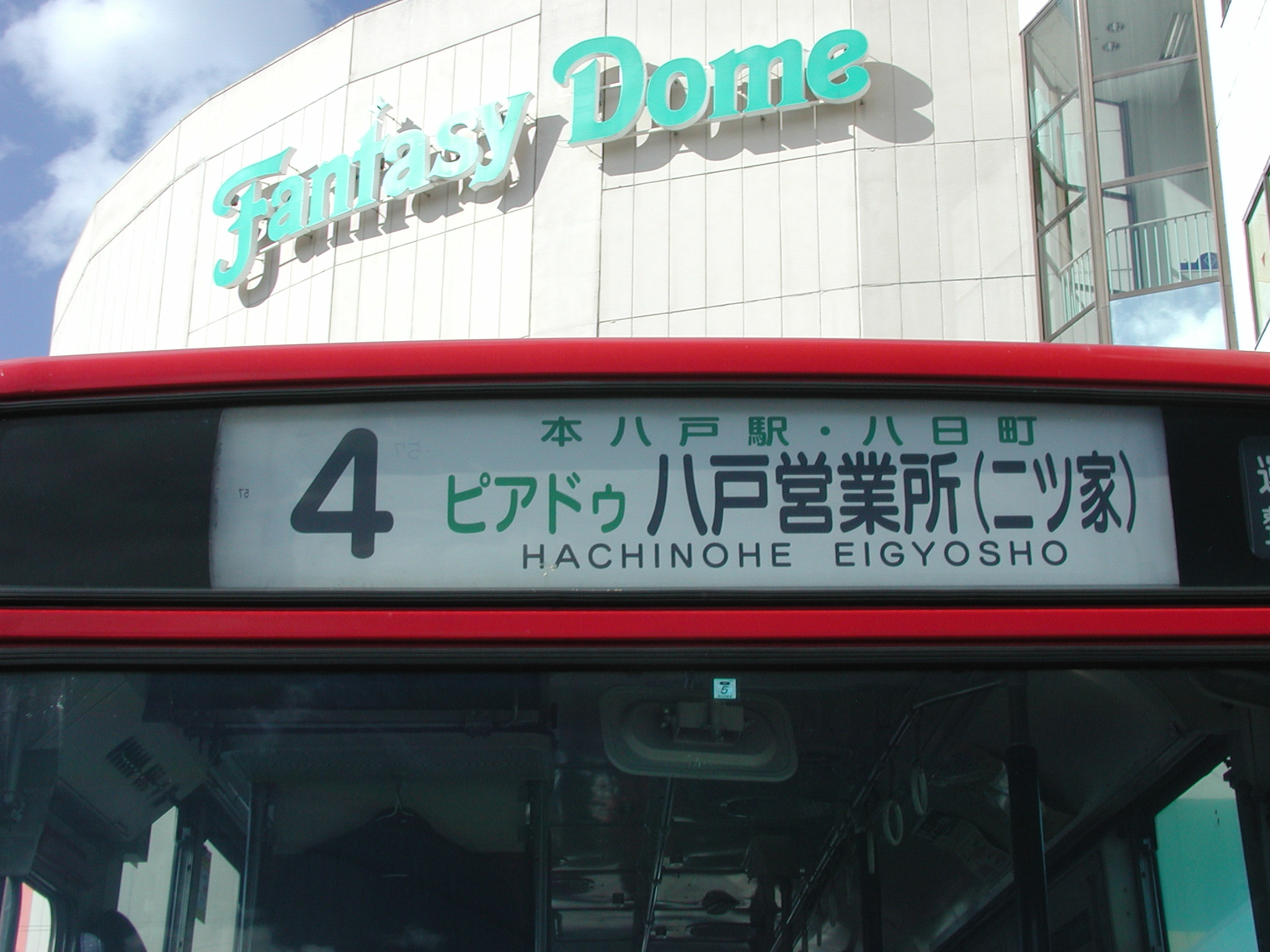 南部バス 行き先表示方向幕（白幕式）の表示例：正面